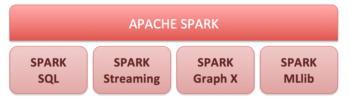 Ce schéma a pour objectif de donner un aperçu visuel des 4 principaux outils offerts par apache spark,.